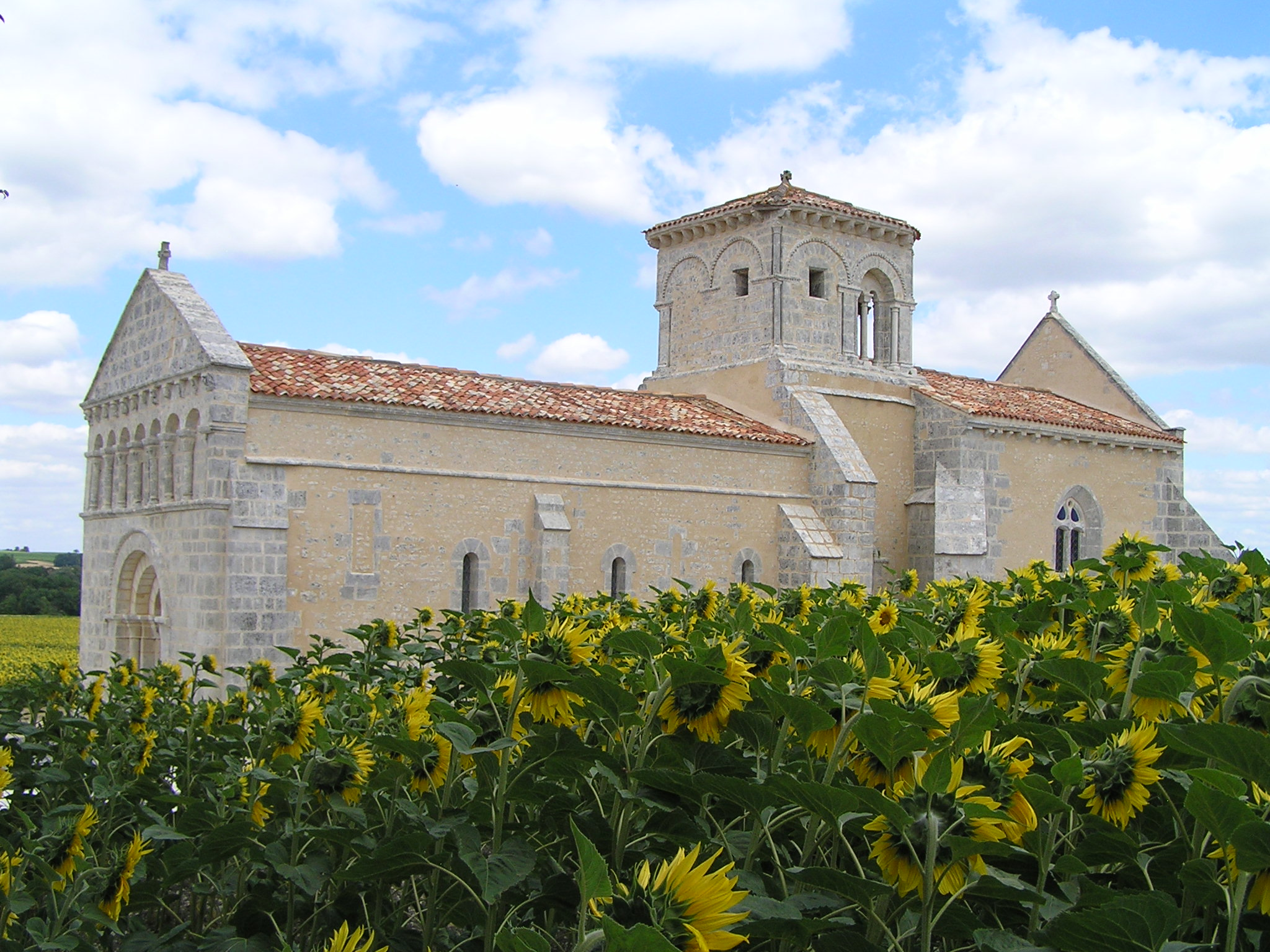 église de Lagarde-sur-le-Né, Charente, France